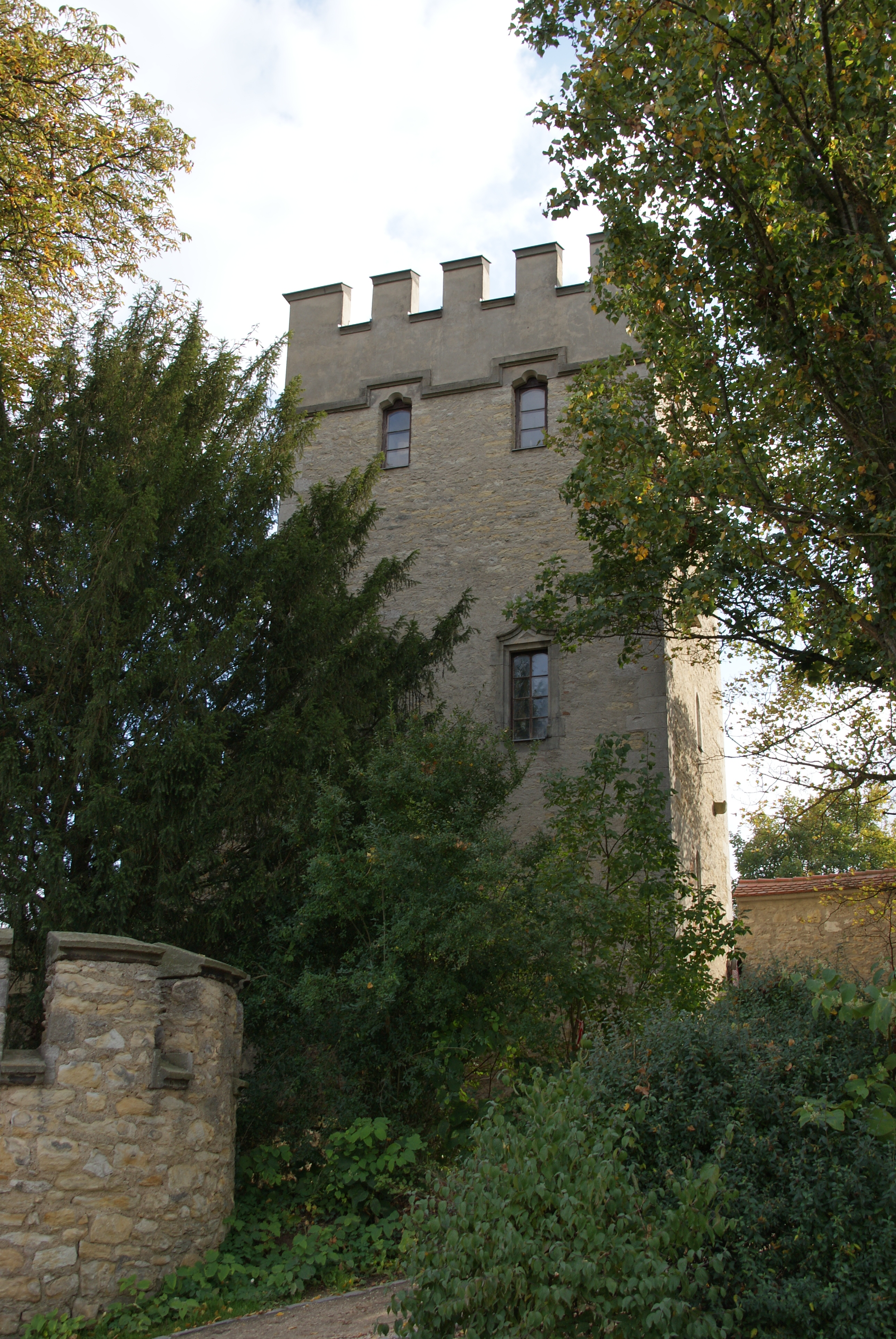 Anatomie- oder Pulverturm in Regensburg, auf dem Gelände der Königlichen Villa, Turm XVI der mittelalterlichen Stadtbefestigung, 1739 für anatomische Untersuchungen verwendet, ab 1812 als Lager für Schießpulver. Mit dem Bau der königlichen Villa wurde deren neugotischem Stil angepasst. This is the photograph of an architectural monument. It is part of the list of cultural monuments of Bayern, no. D-3-62-000-1746